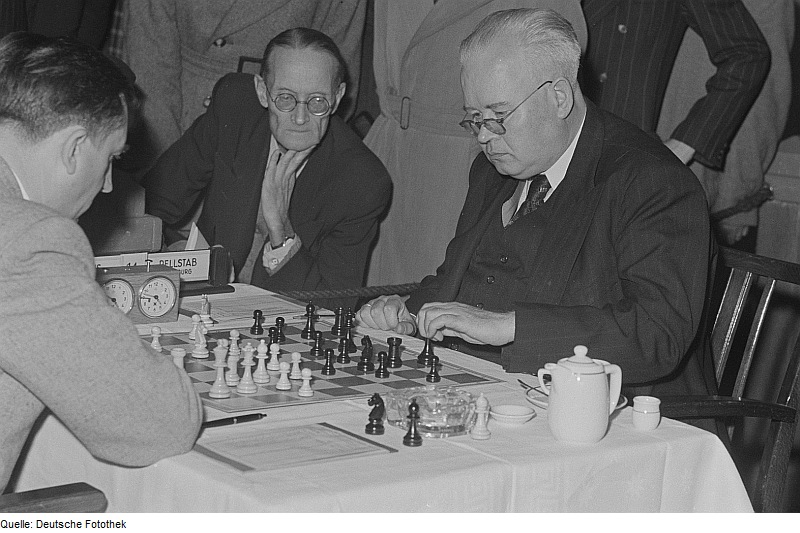 Original image description from the Deutsche Fotothek Schachspieler Ludwig Rellstab aus Hamburg und Kraus aus Weilheim bei den Deutschen Schachmeisterschaften